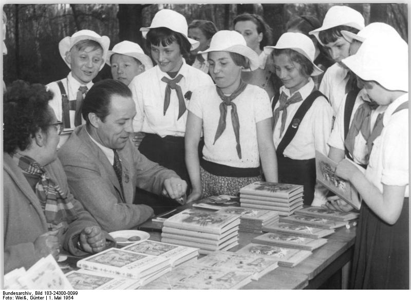 Zentralbild Weiß 2.5.1954 Volksfest am 1. Mai im Pionierpark "Ernst Thälmann" Wuhlheide Im Pionierpark "Ernst Thälmann", Wuhlheide, hatten sich am 1. Mai 1954 wie überall auf den Strassen und Plätzen die Werktätigen Berlins nach der Demonstration zu Tanz und Darbietungen zahlreichen Kapellen und Kulturensembles zusammengefunden. UBz: Schriftstellerin Ilse Korn und Schriftsteller Willi Meinck und die Pioniere der 1. Oberschule in Berlin-Köpenick am Bücherbazar des Deutschen Schriftstellerverbandes.